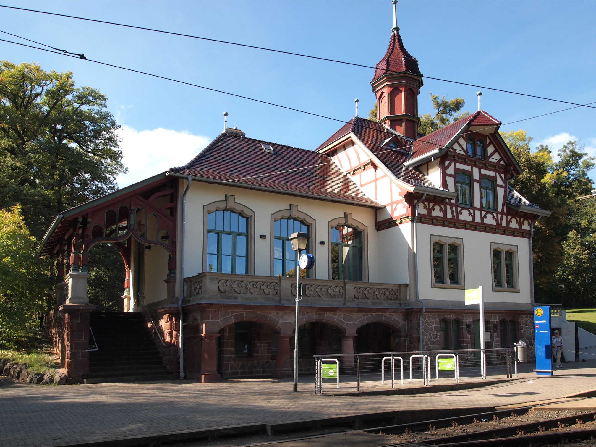 Alter Bahnhof der Straßenbahnlinie 1 (Endstation), heute Tourist-Information